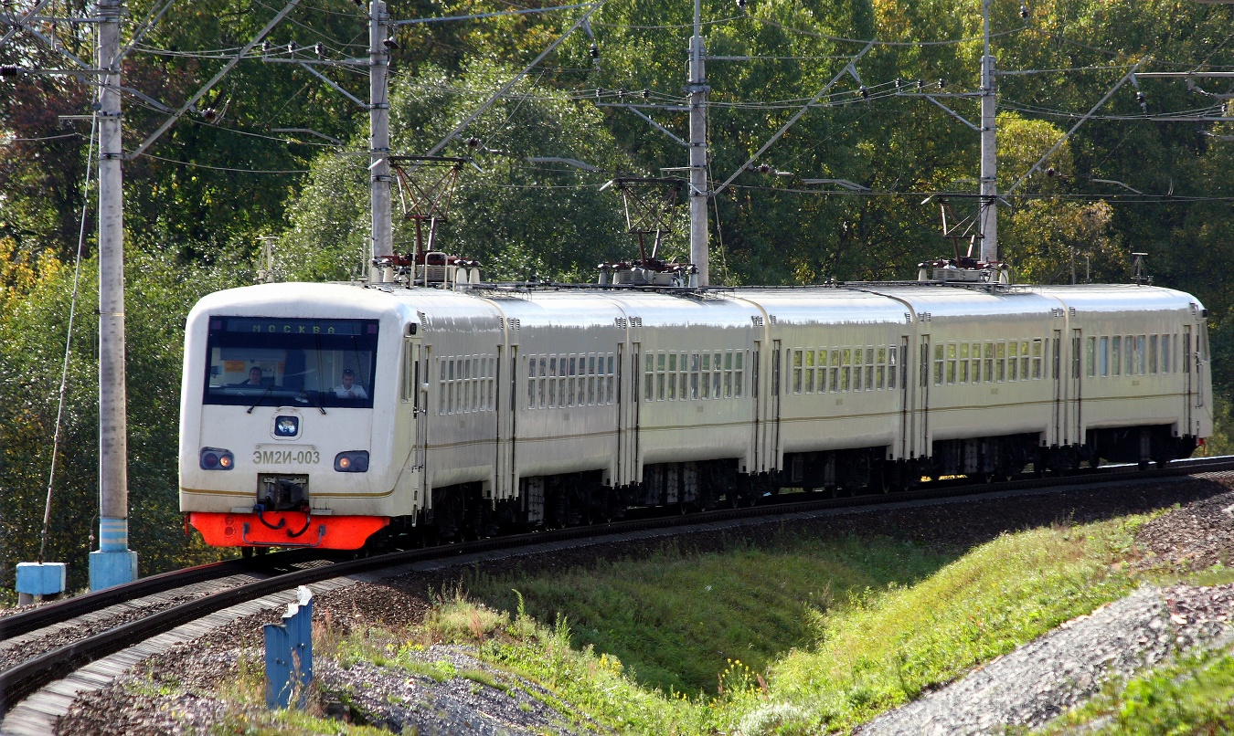 Электропоезд ЭМ2И 003 на перегоне Крёкшино - Толстопальцево Московской железной дороги